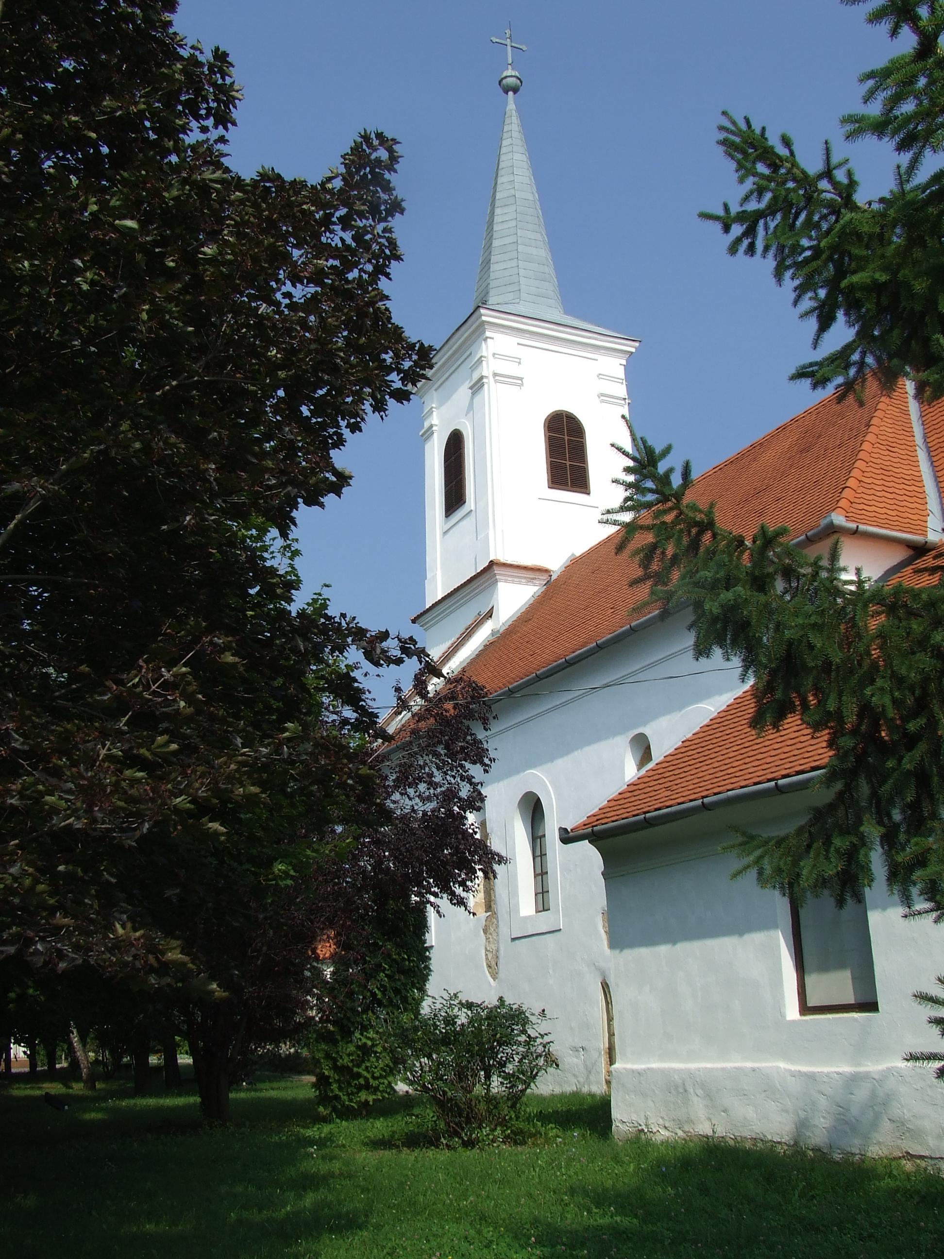 A bakonyai Árpád-kori Szent György-templom